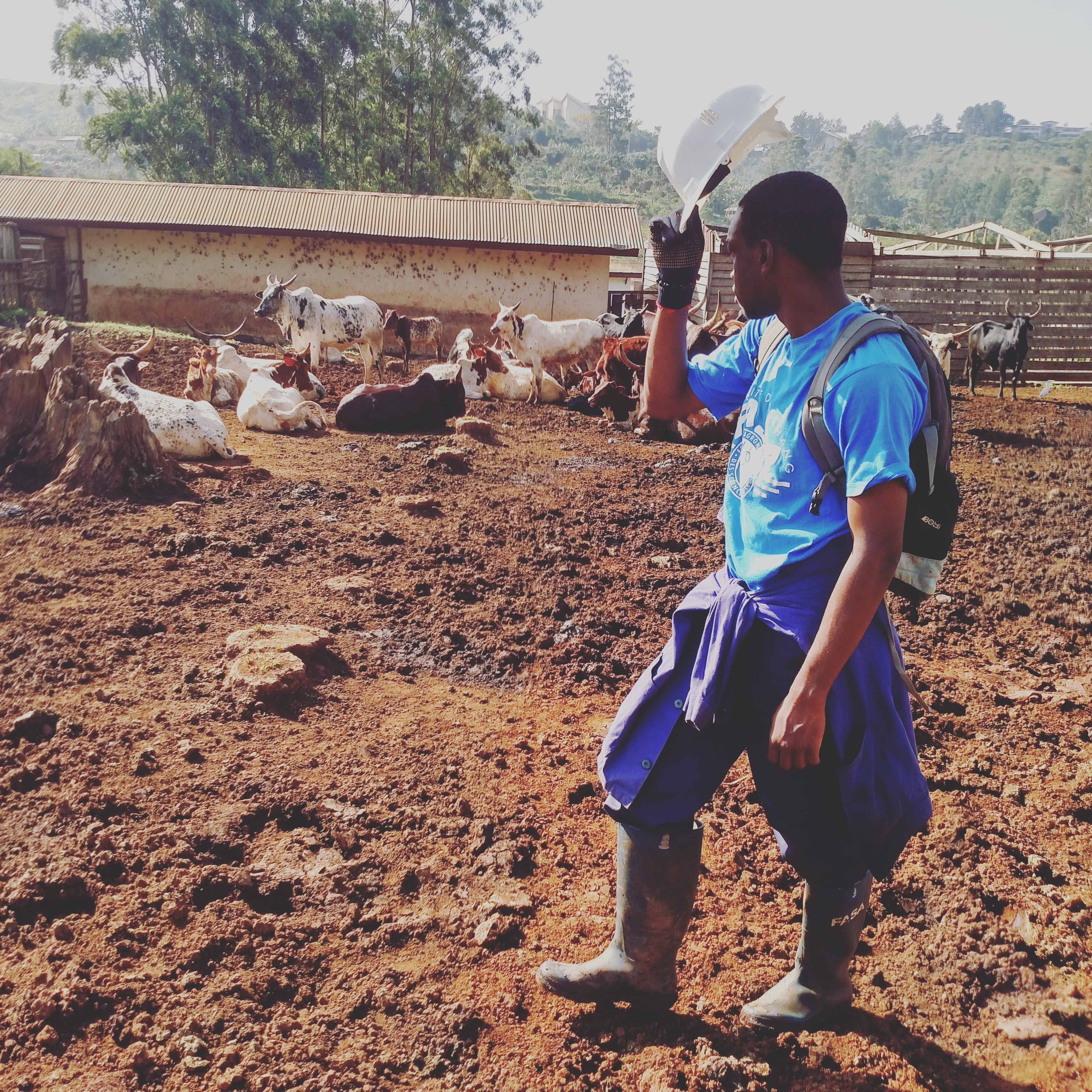 Photo réalisée à l'ouest Cameroun dans l'enceinte de l'Université de dschang,( ferme de la faculté d'agronomie et des sciences agricoles). L'éducation est la base du développement futur de l'Afrique et l'agronomie un pilier, ce futur ingénieur en est un acteur. This is an image of "African people at work" from Cameroon